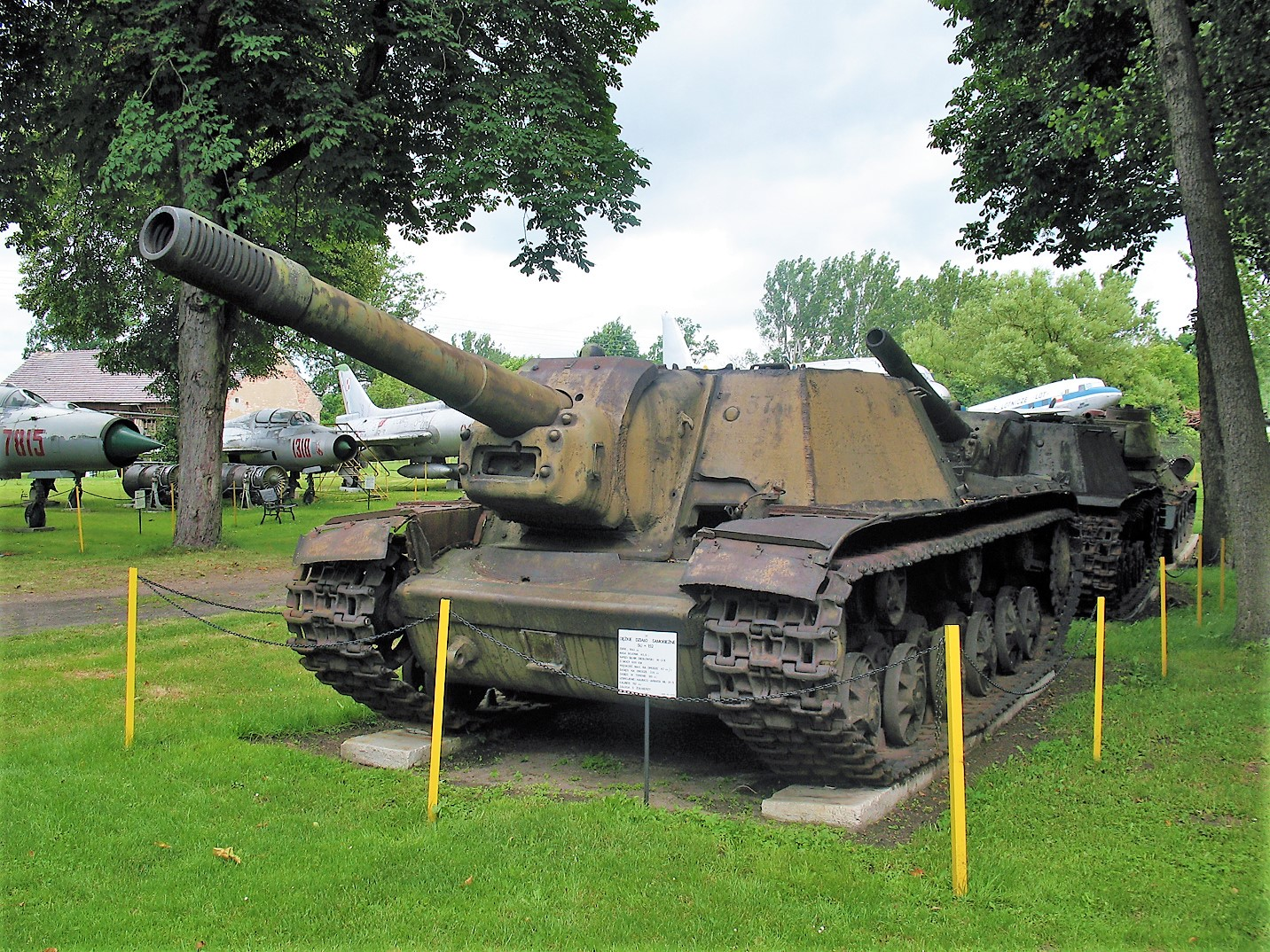 Ciężkie działo samobieżne SU-152, konstrukcji sowieckiej. Ze zbiorów Lubuskiego Muzeum Wojskowego w Drzonowie.